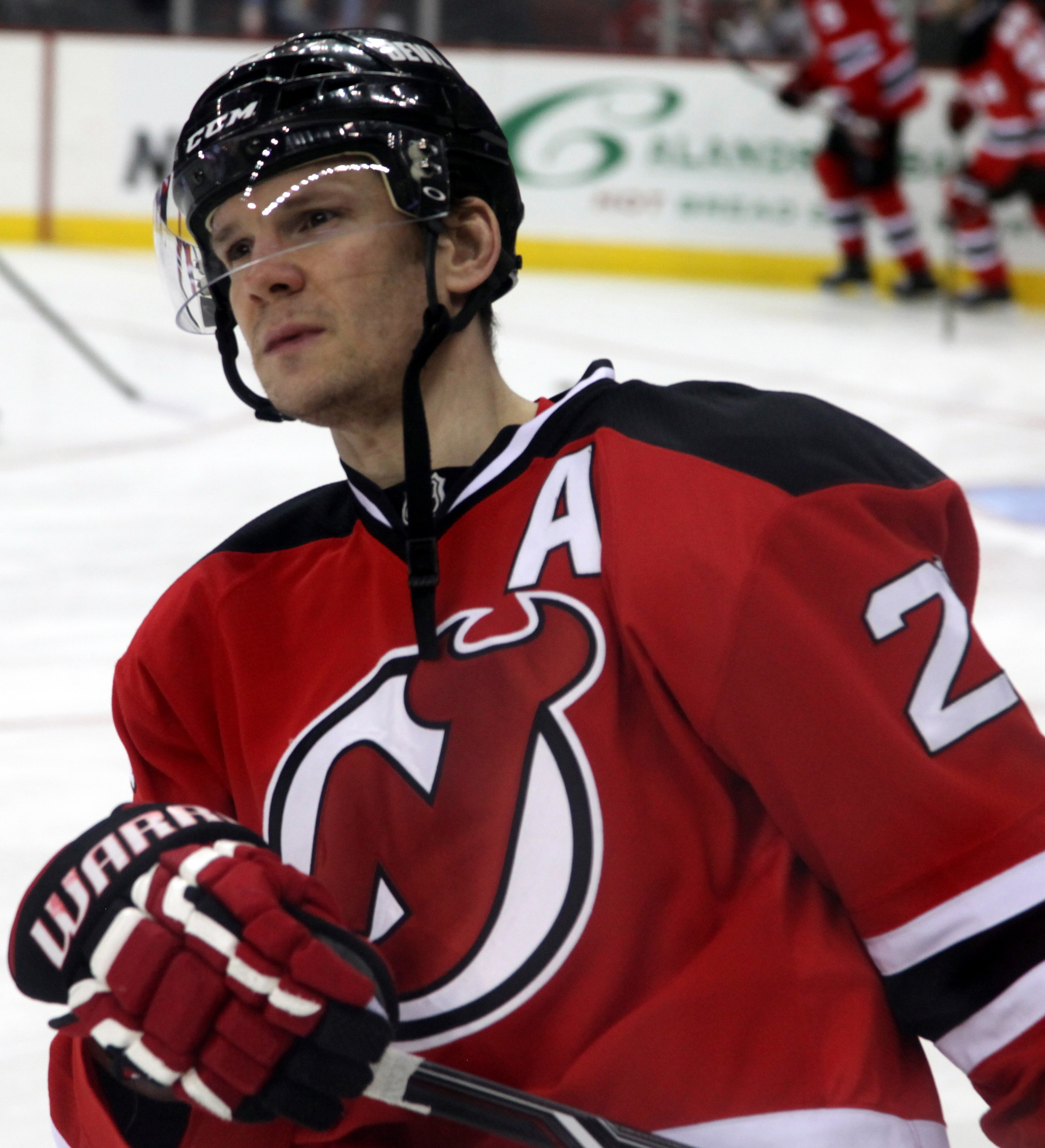 Elias in 2014.